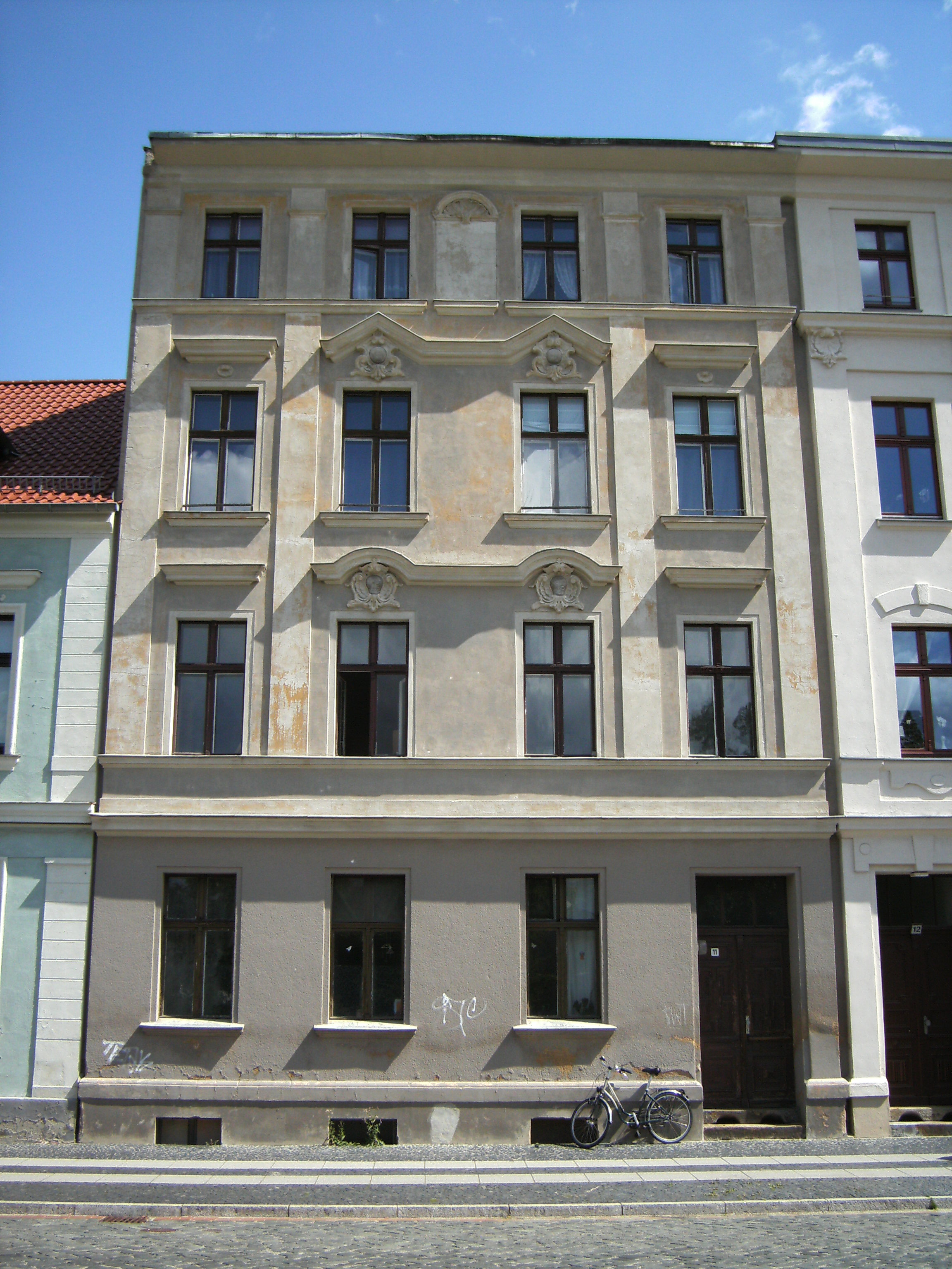 Wernerstr. 11